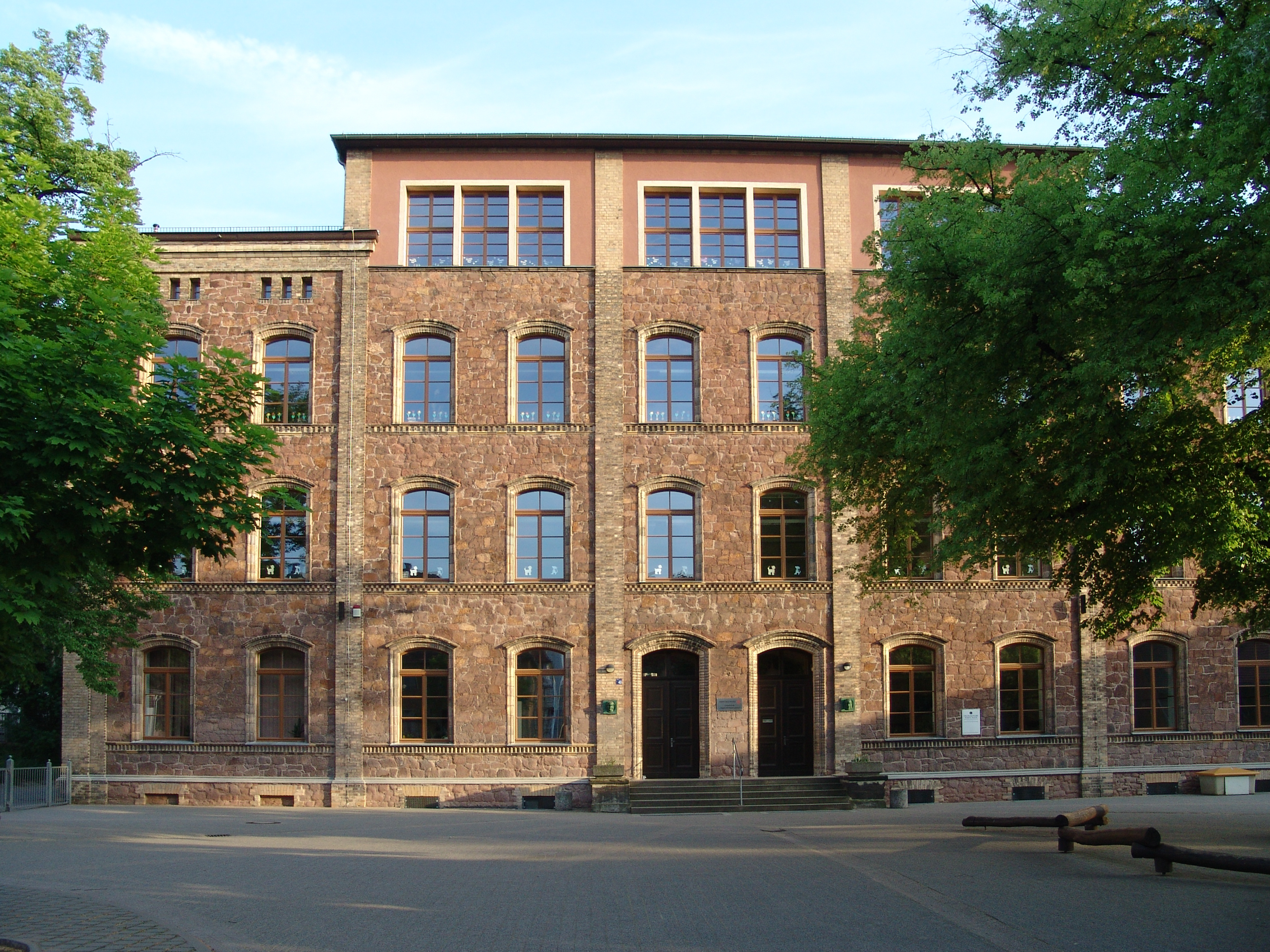 Franckesche Stiftungen in Halle, Grundschule "August Hermann Francke"